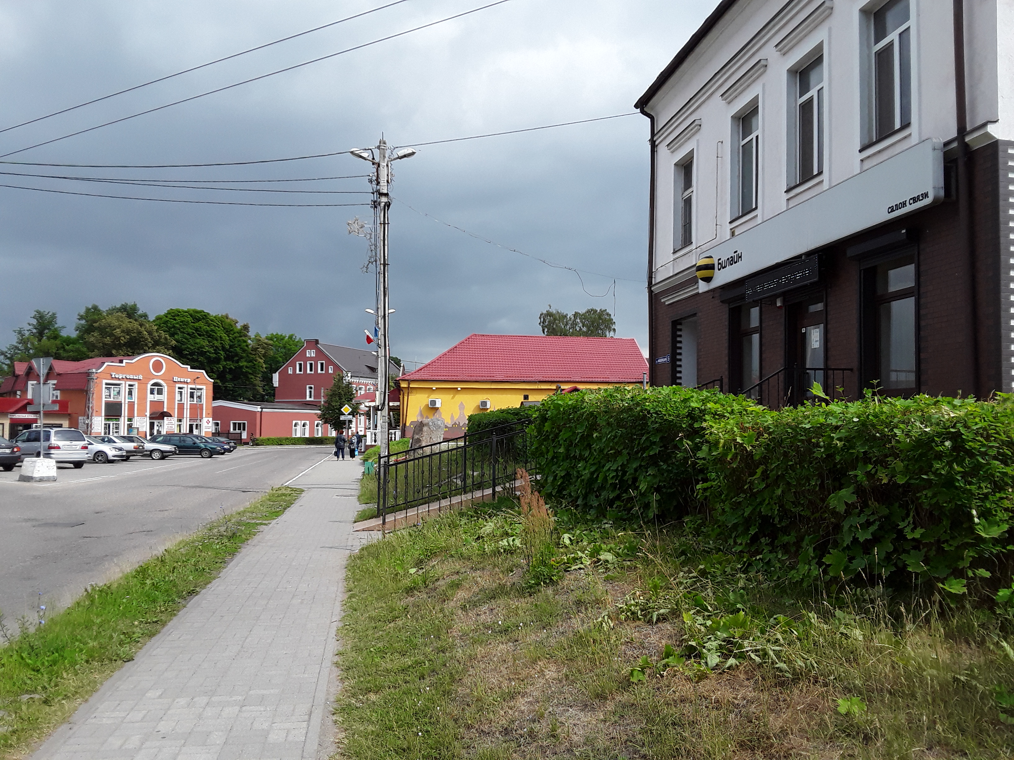 Heiligenbeil: heutiges Zentrum